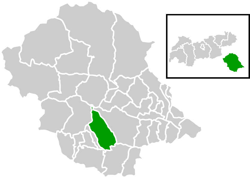 Lage der Gemeinde innerhalb des Bezirks Lienz